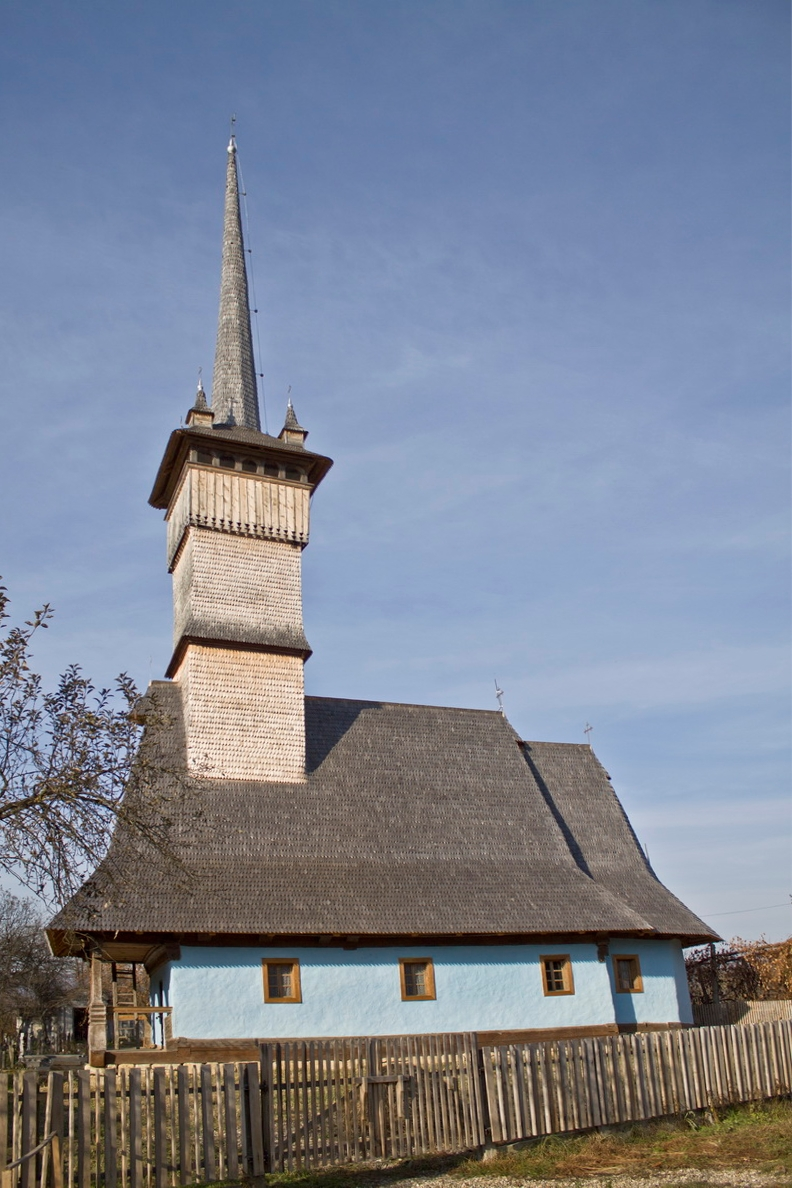 Biserica de lemn (1813) din Lozna, judeţul Sălaj.